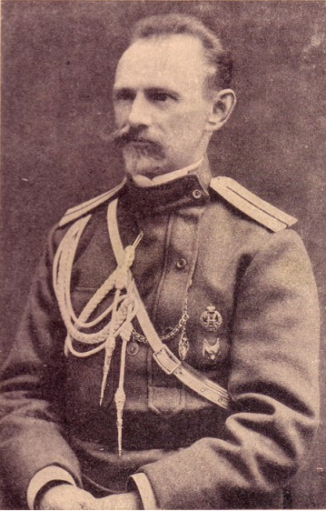 Karl Gustav Ferdinand Grönhagen (1865 - 1944)